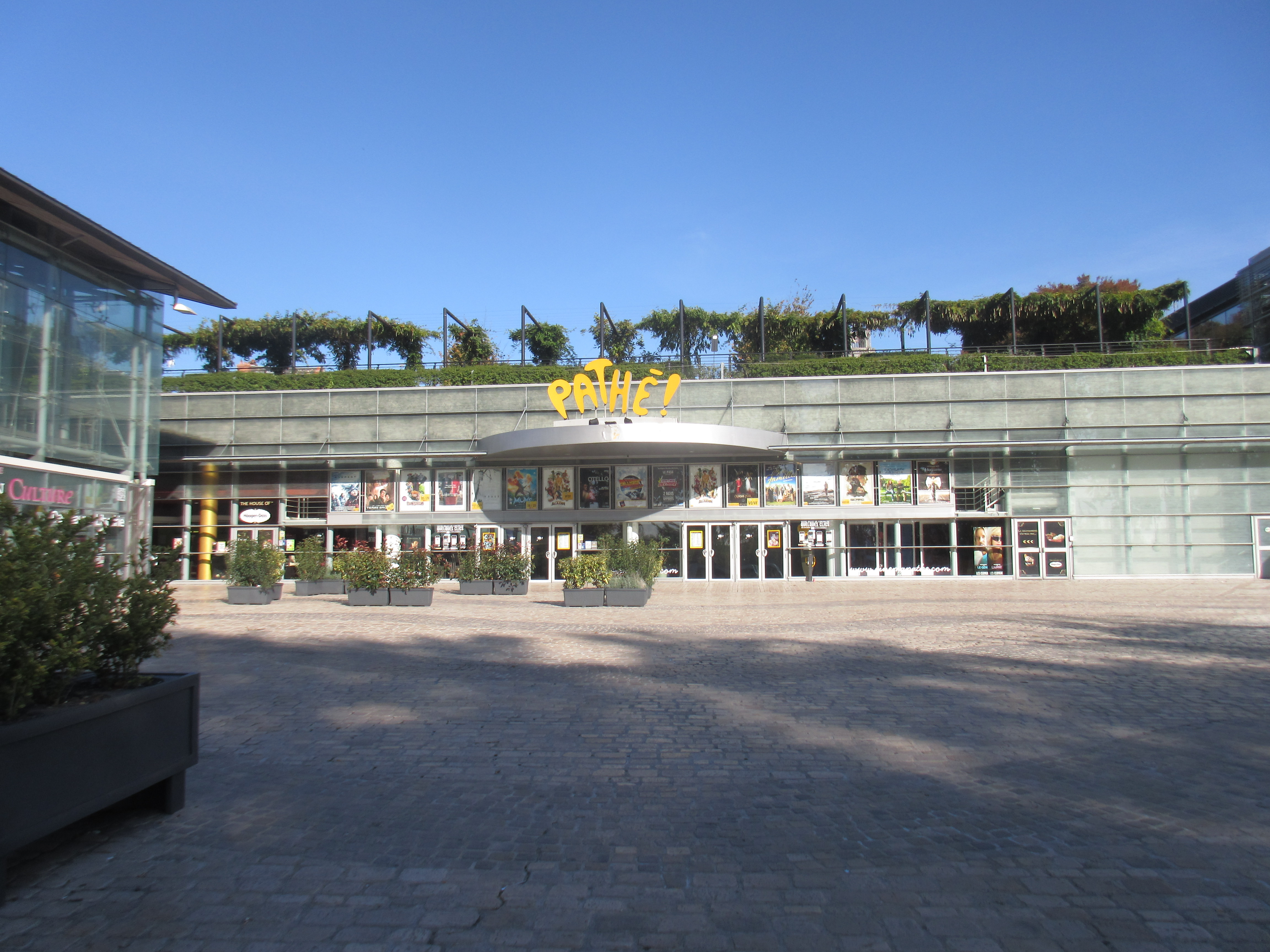 Cinéma Pathé Place de Loire, Orléans, Loiret, France